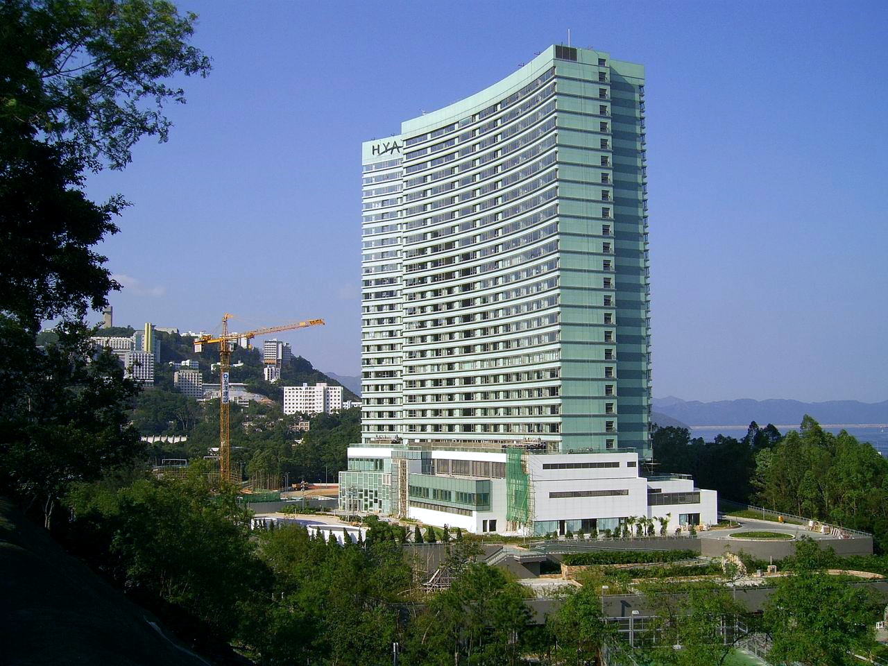 中文（香港）: 香港中文大學教學酒店